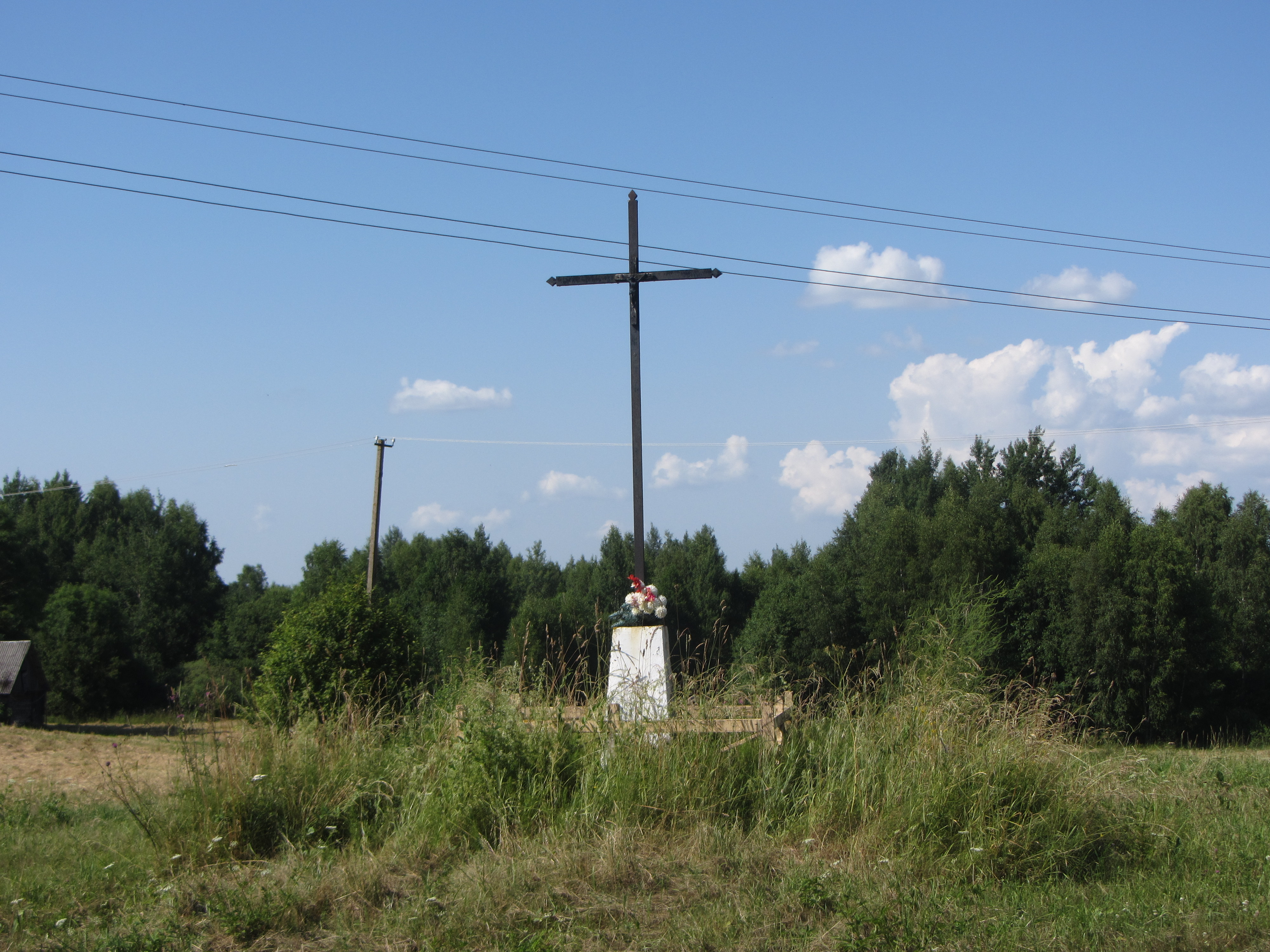 Balninkų sen., Lithuania